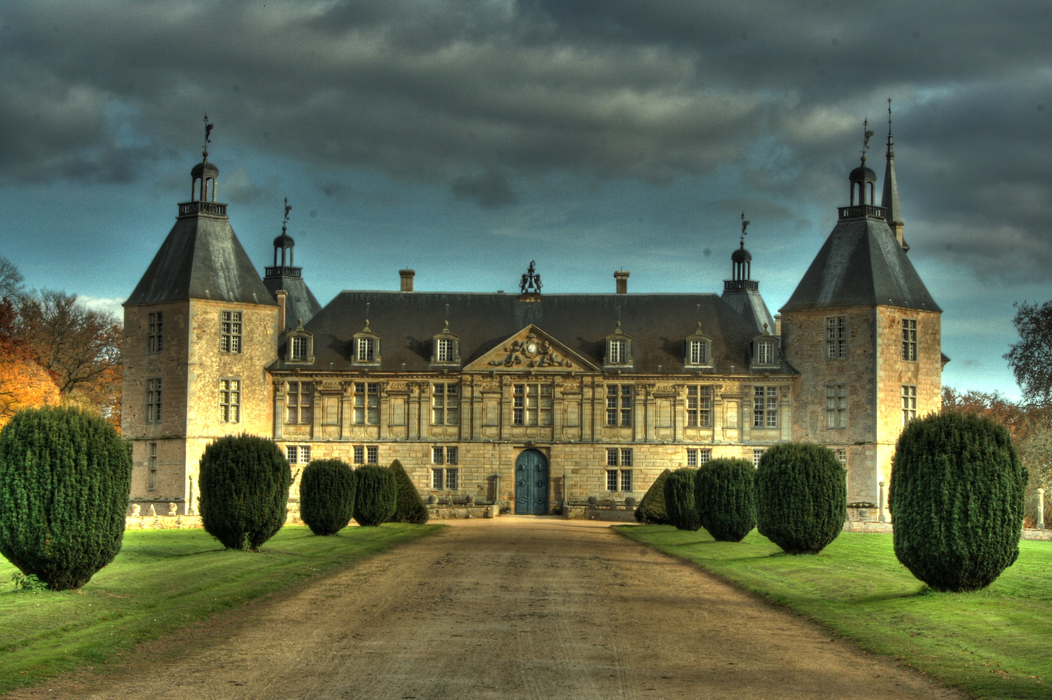 HDR du Chateau de Sully en Saone et Loire .